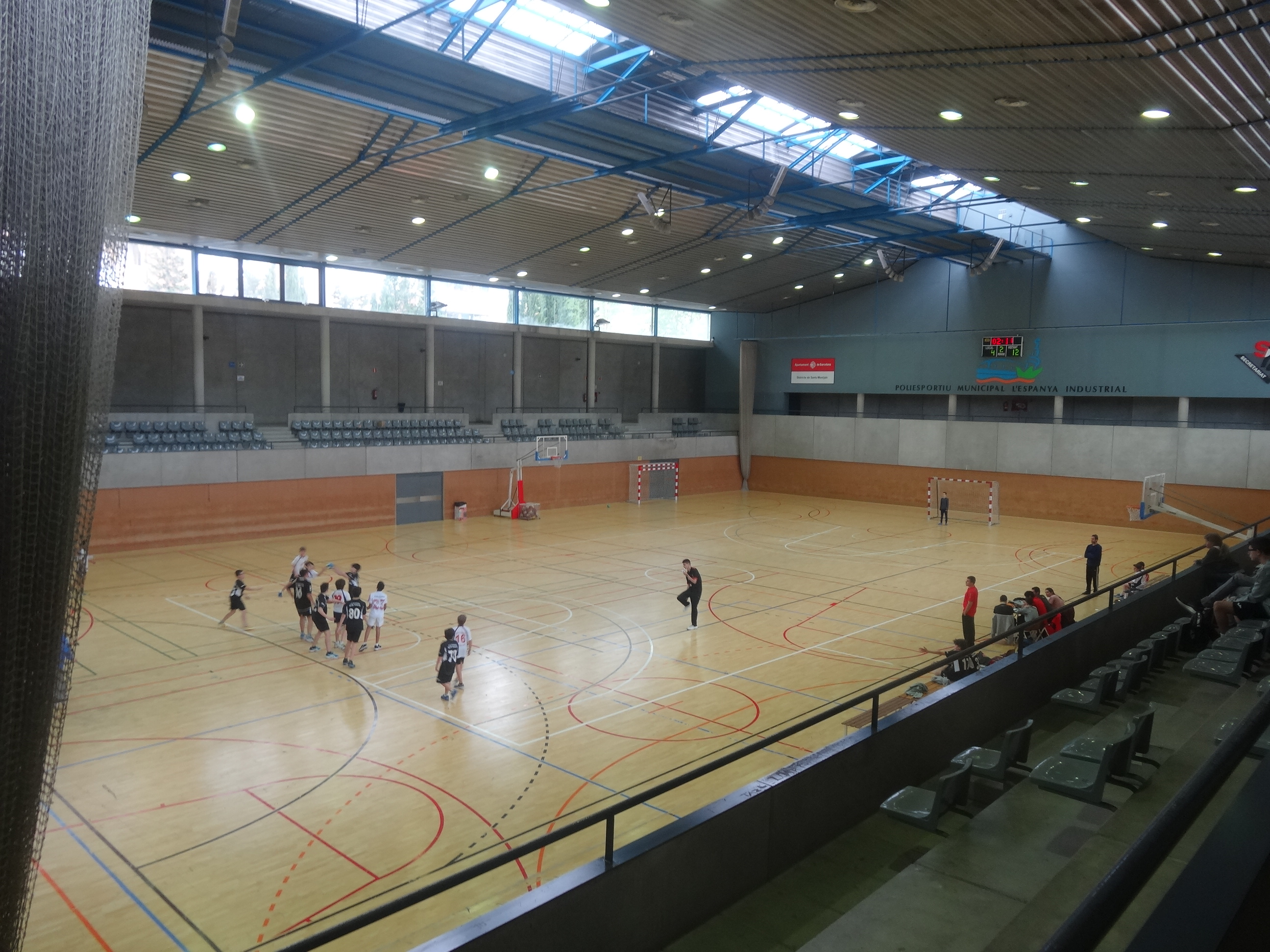 Centre Esportiu Municipal l'Espanya Industrial